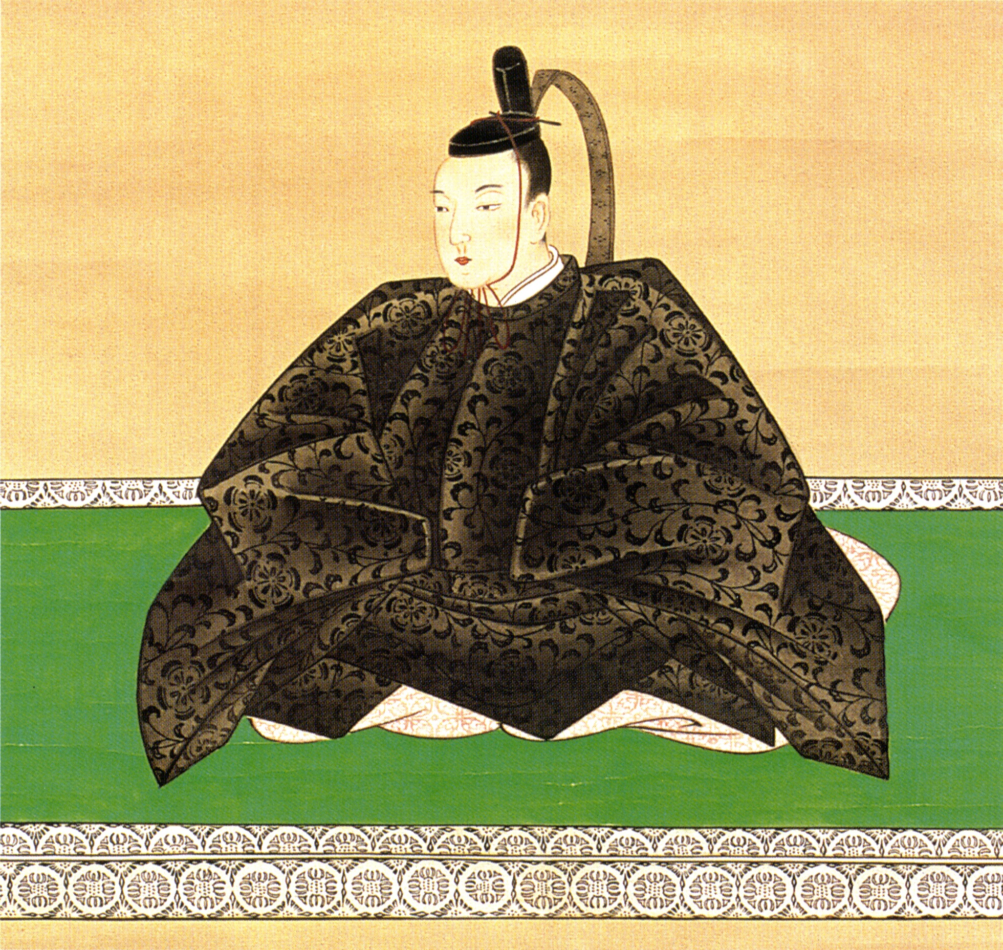 二条宗煕の肖像。